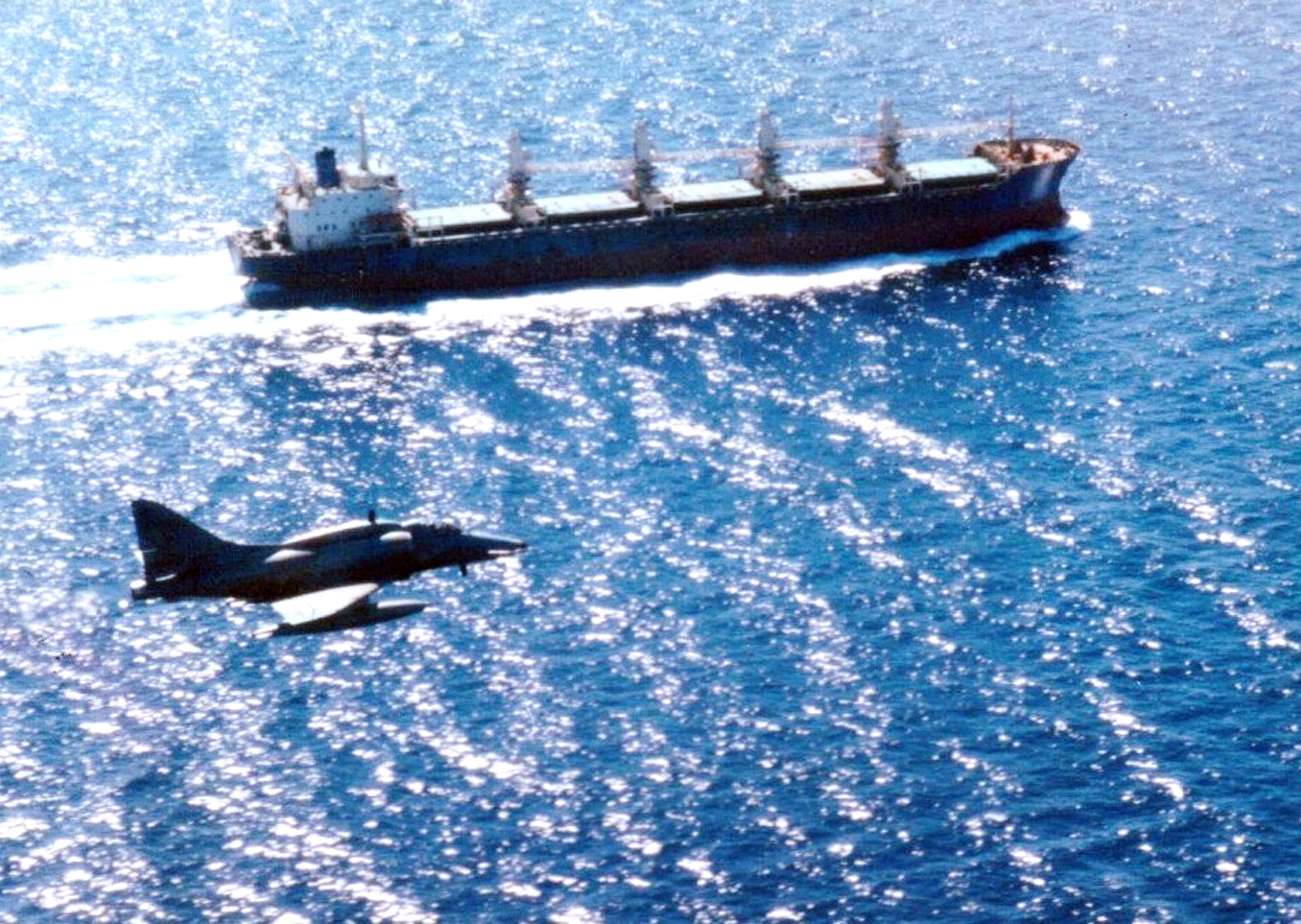 Pesawat A-4 Skyhawk terbang membayangi sebuah kapal barang menuju perairan Filipina di lepas pantai Utara Manado, dalam rangka operasi Pengamanan ALKI II